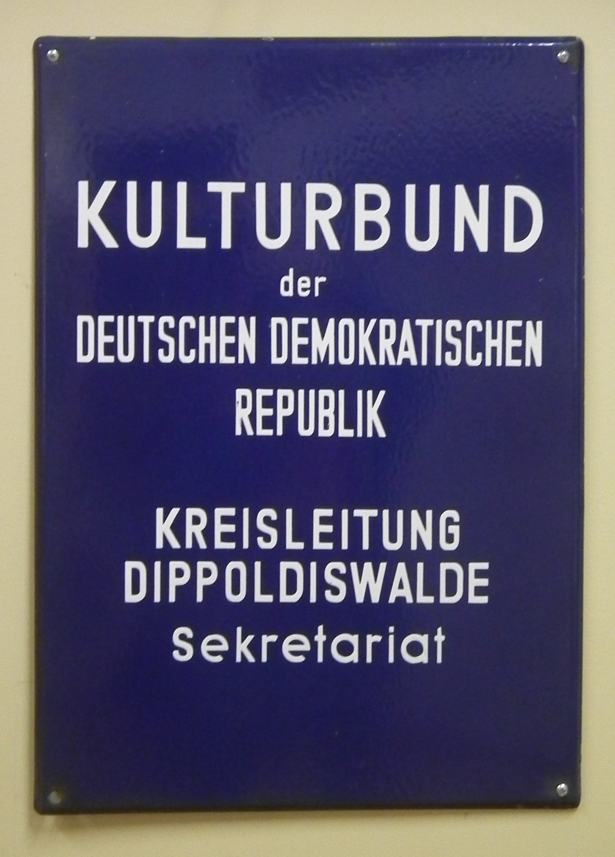 DDR-Museum Pirna, Türschild Kulturbund der DDR Dippoldiswalde, Veröffentlicht mit Genehmigung der Museumsleitung